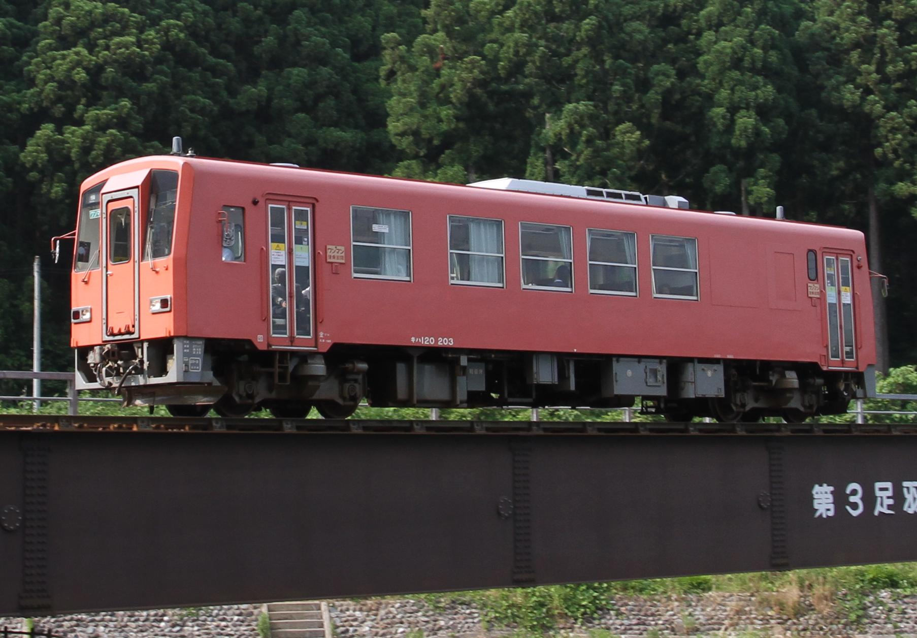 JR西日本 キハ120-203 撮影 越美北線 一乗谷～越前高田間 撮影日時 2012/06/03 撮影者 Mkb